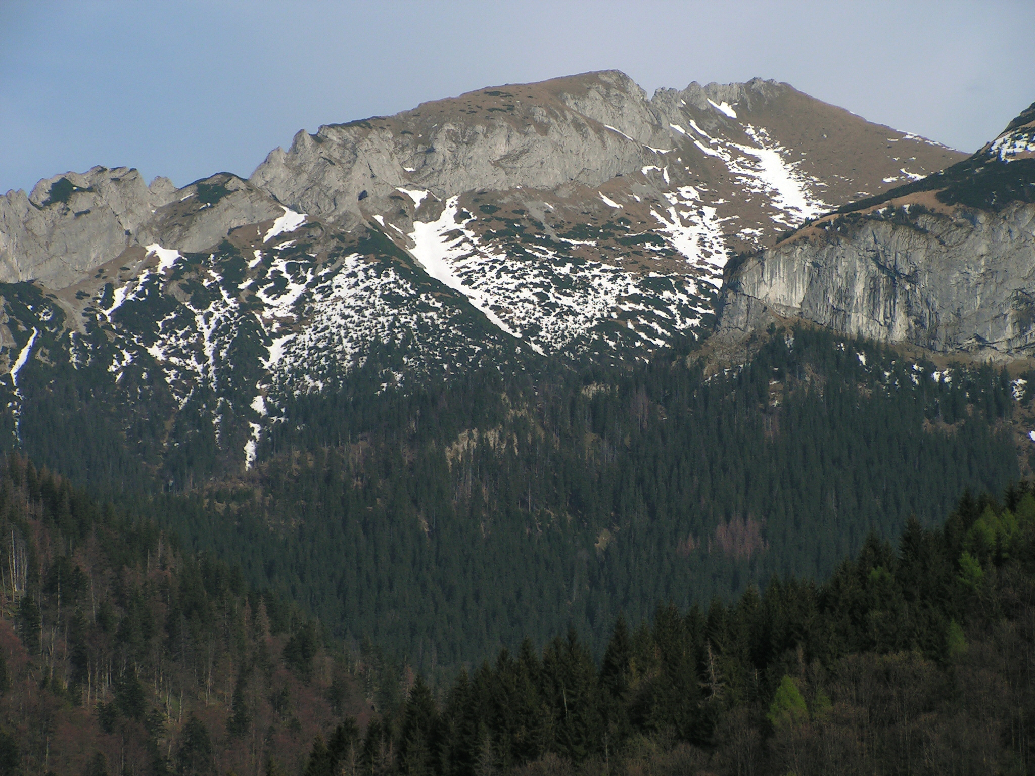 Nový from Tatranská Javorina